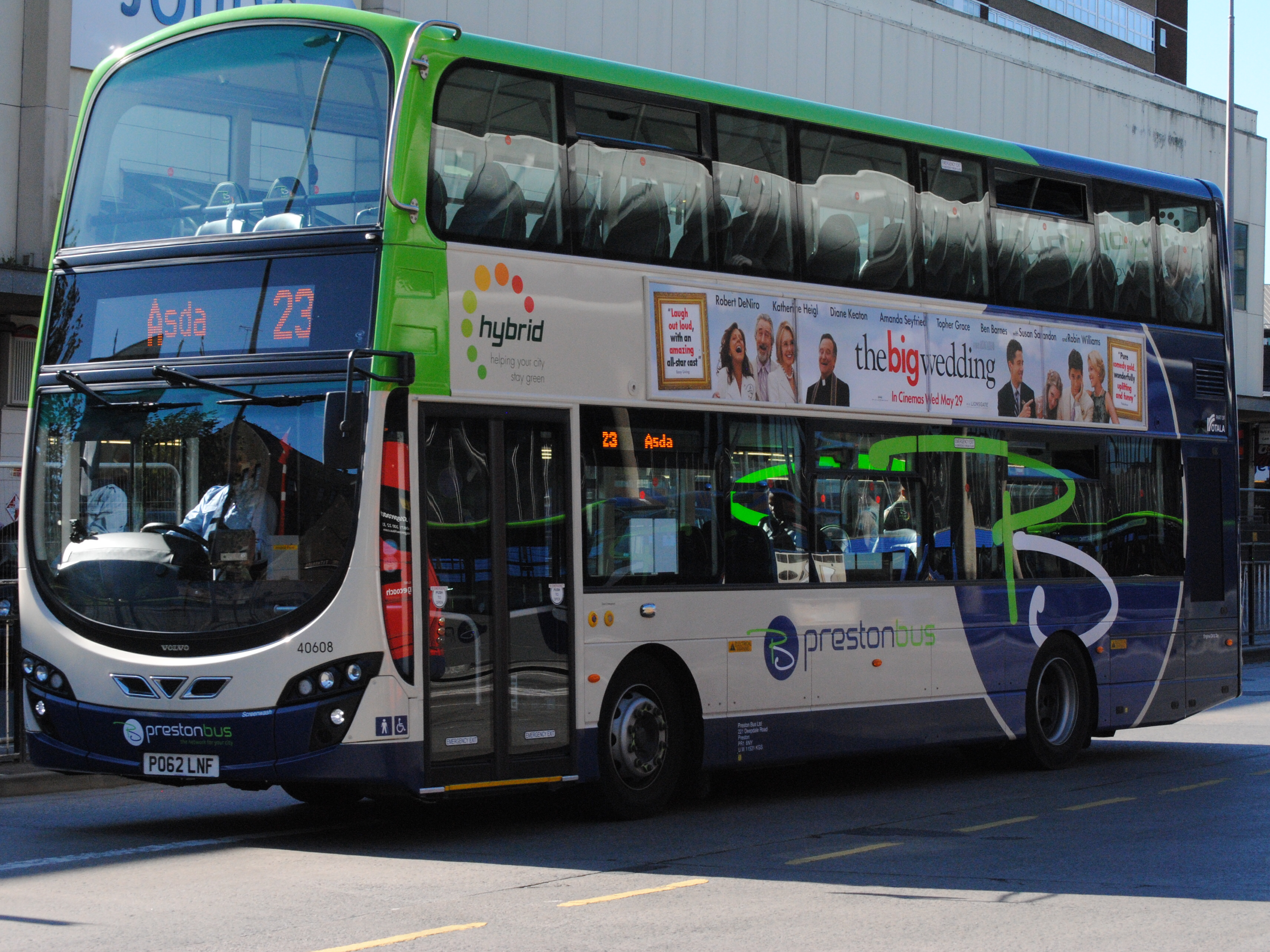 Volvo B5L Wright Gemini 2 Hybird